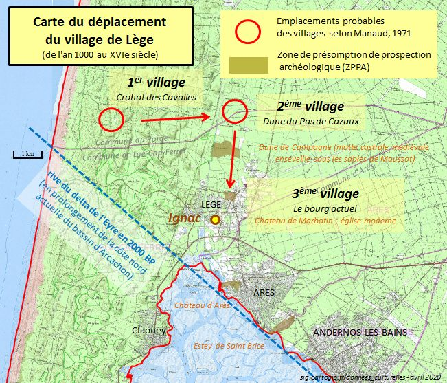 carte d'après Manaud, 1971 cité par Ragot, 1992 (thèse de 3e cycle de géographie physique pour l’obtention du titre de docteur en géomorphologie par François Manaud, « L'évolution morphologique récente du Bassin d'Arcachon » 1971, faculté des lettres et sciences humaines de l’université de Bordeaux.